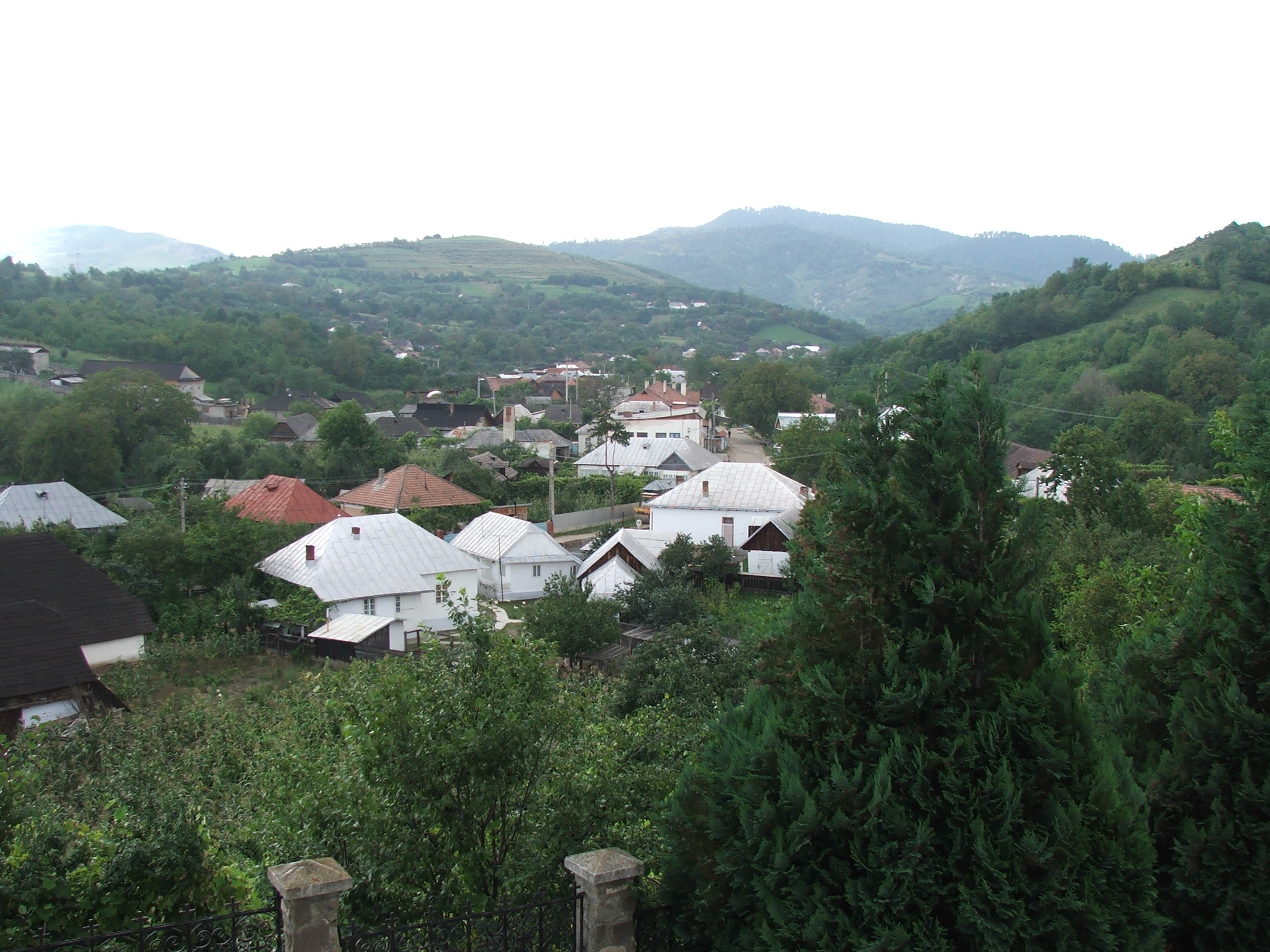 Măgireşti (Romania)